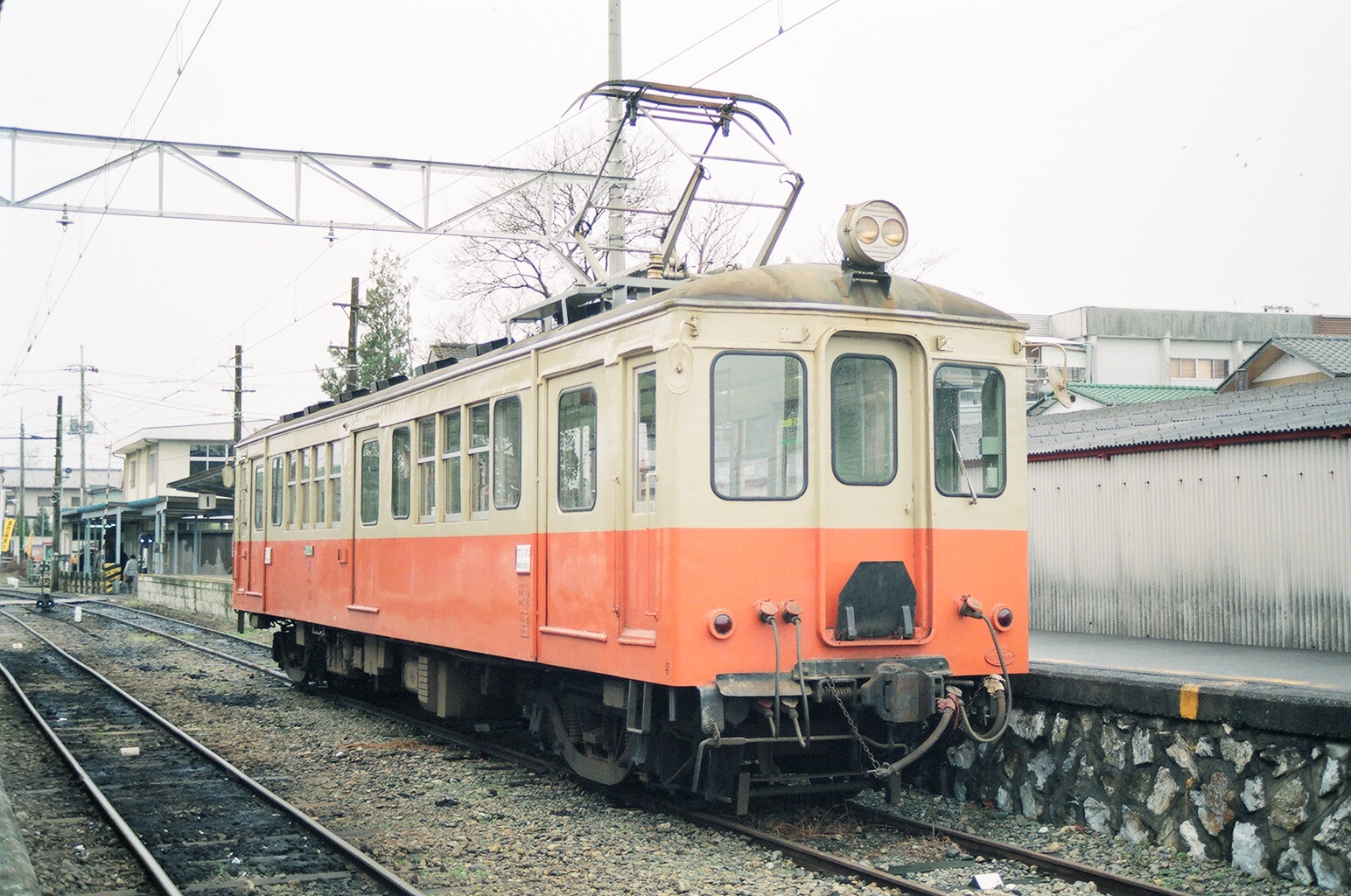 日立電鉄のモハ12、常北太田駅にて撮影（1991年）